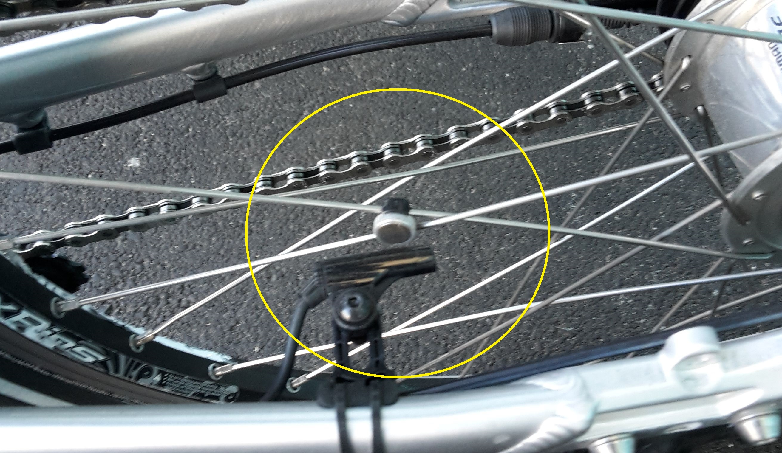 Umdrehungs-Sensor am Hinterrad: Hallsensor am Hinterbau, Permanentmagnet an Speichen